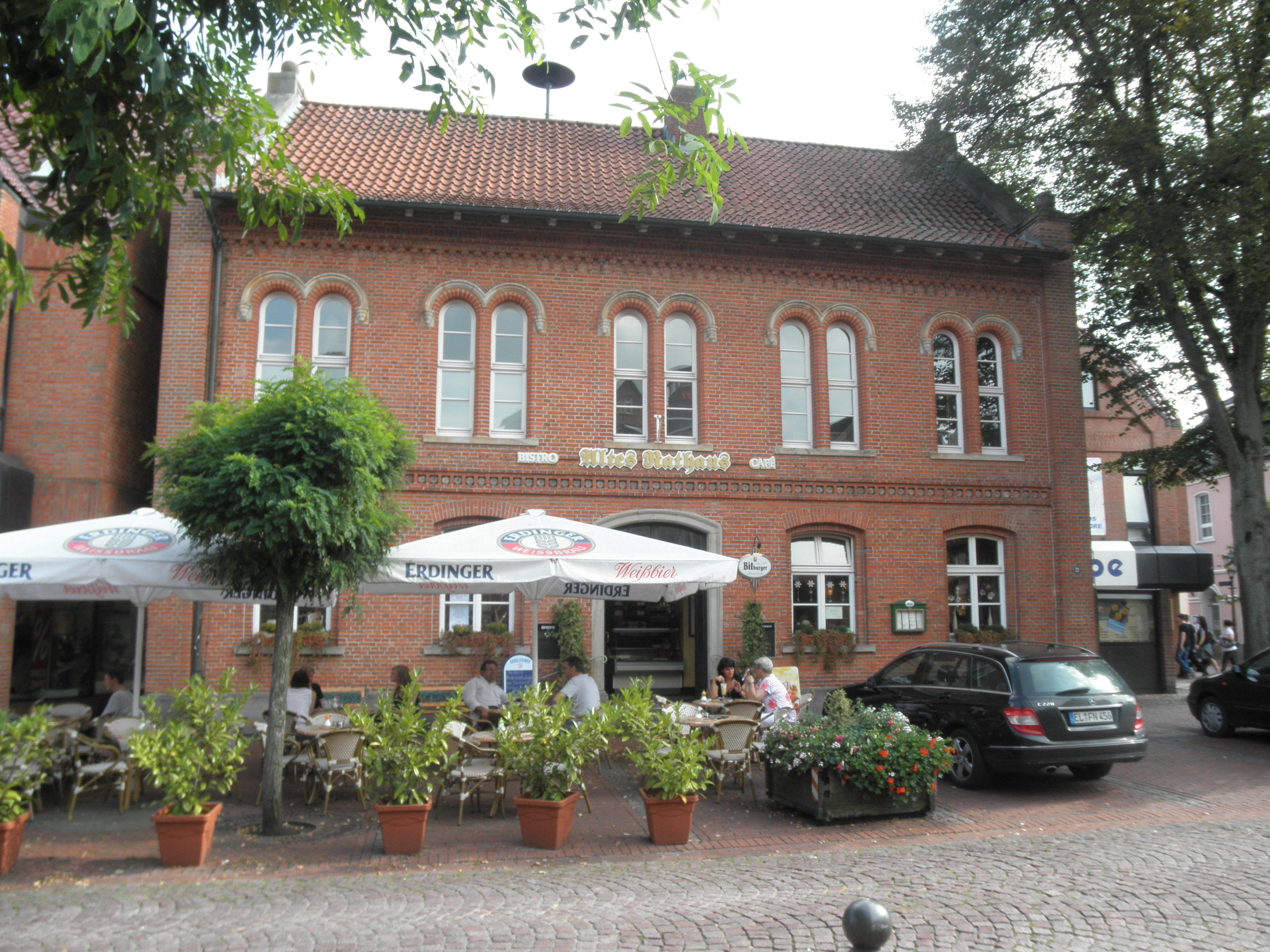 kafejo "Altes Rathaus" en Haselünne, Germanio